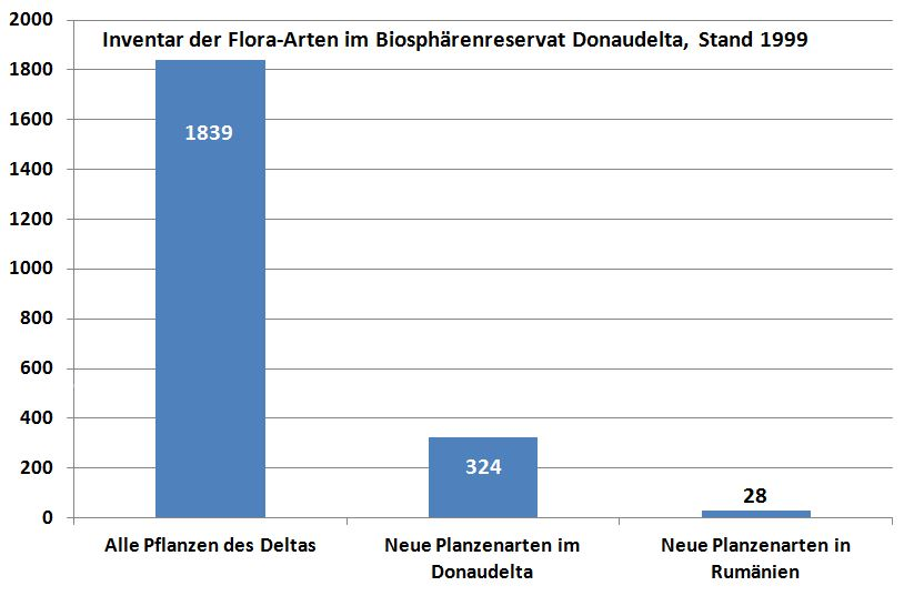 Inventar der Flora-Arten im Biosphärenreservat Donaudelta, Stand 1999.JPG